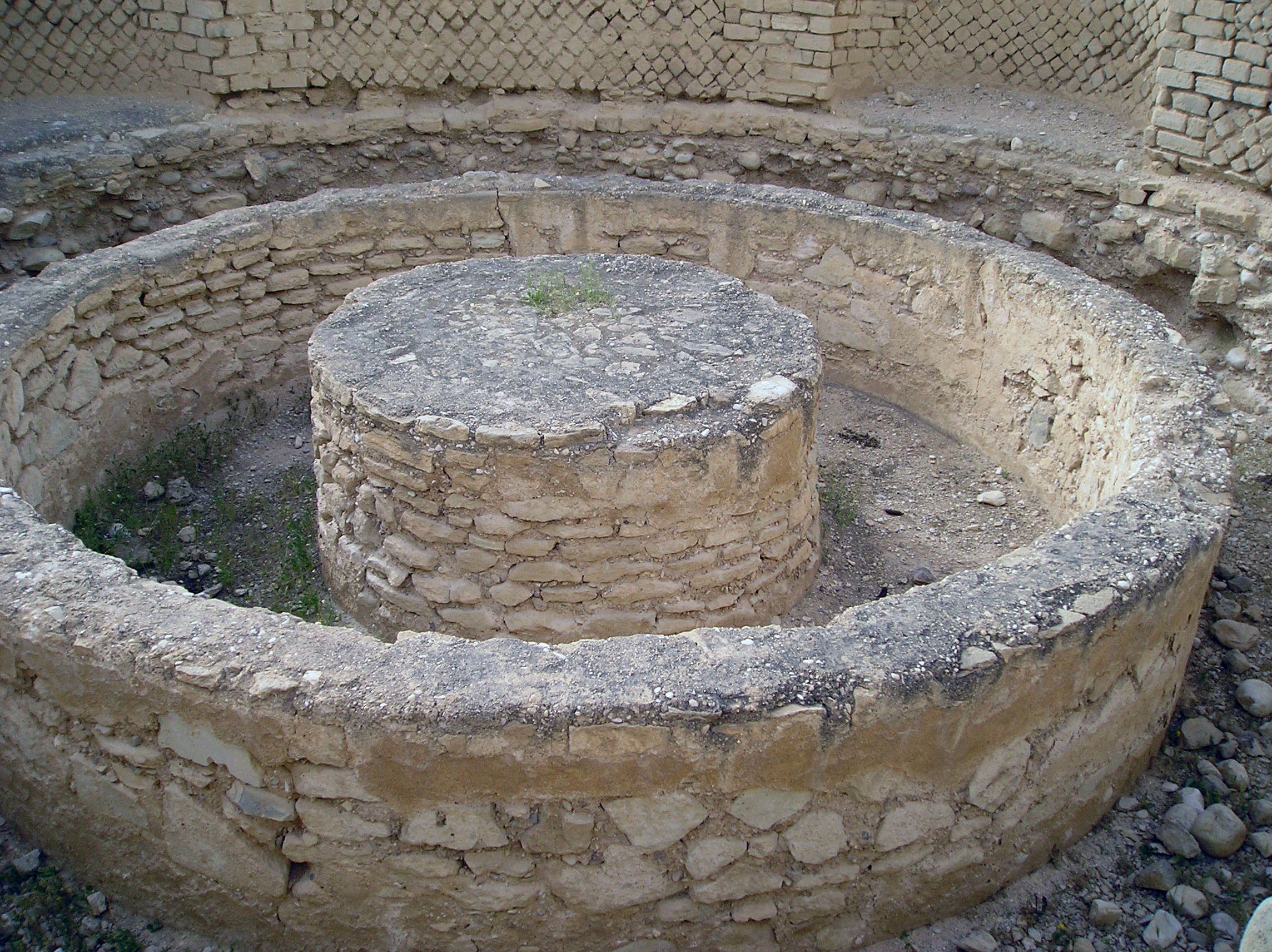 Laconicum w termach pałacu Heroda Wielkiego. Strefa wykopalisk na Tulul Abu el-Alayiq. Jerycho z czasów Hasmoneuszy i Heroda Wielkiego (od II w. przed Chr. do I w. po Chr.). Prace prowadzili: C. Warren - 1868, E. Sellin, C. Watzinger - 1909 e 1911, J. Kelso, D. Baramki, J. Pritchard - 1950-1951, G. Foerster e E. Netzer - 1973-1983 oraz 1986-1988. Badania trwają po dziś dzień. Zdjęcie wykonał A. Sobkowski dn. 9 marca 2006.